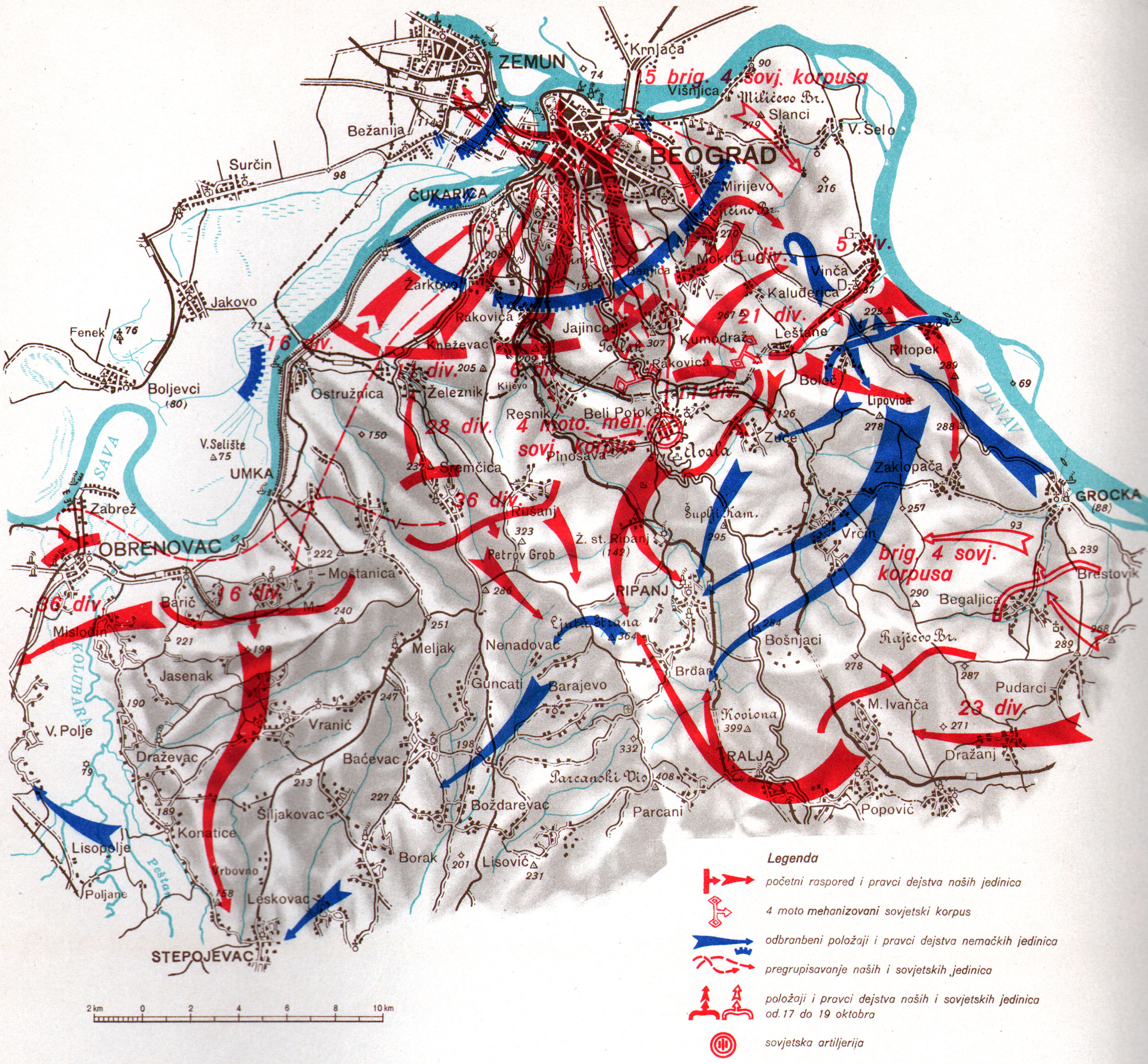 Srpskohrvatski / српскохрватски: Beogradska operacija (od 14 do 20 oktobra 1944 godine))